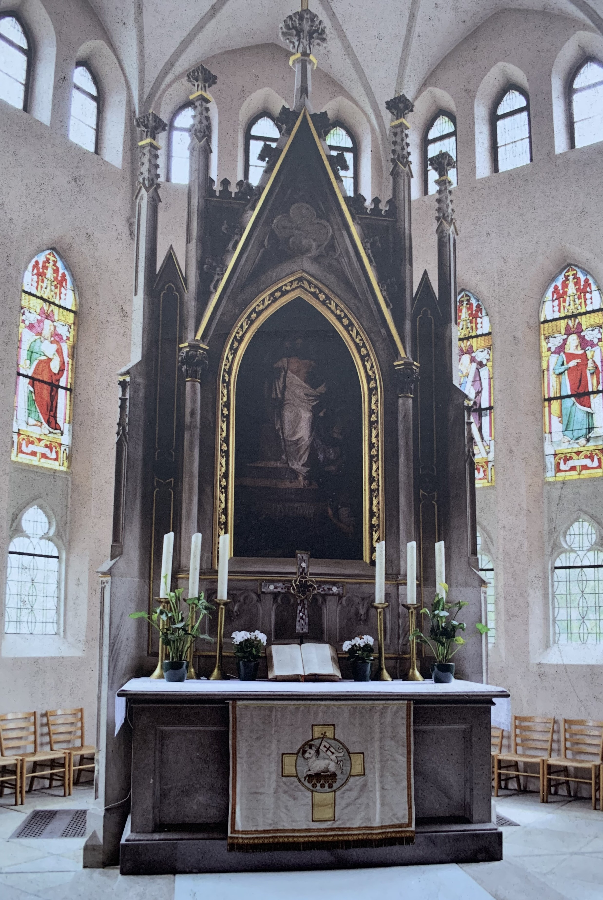 Die Stadtkirche St. Andreas entstand in den Jahren 1859 bis 1863 und befindet sich in Selb im Landkreis Wunsiedel in Bayern. Aufnahme einer öffentlich zugänglichen Informationstafel der Kirchengemeinde vor dem Westportal der Kirche in Selb.